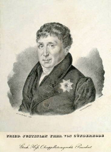 Friedrich Justinian von Günderrode, Porträt, 1830